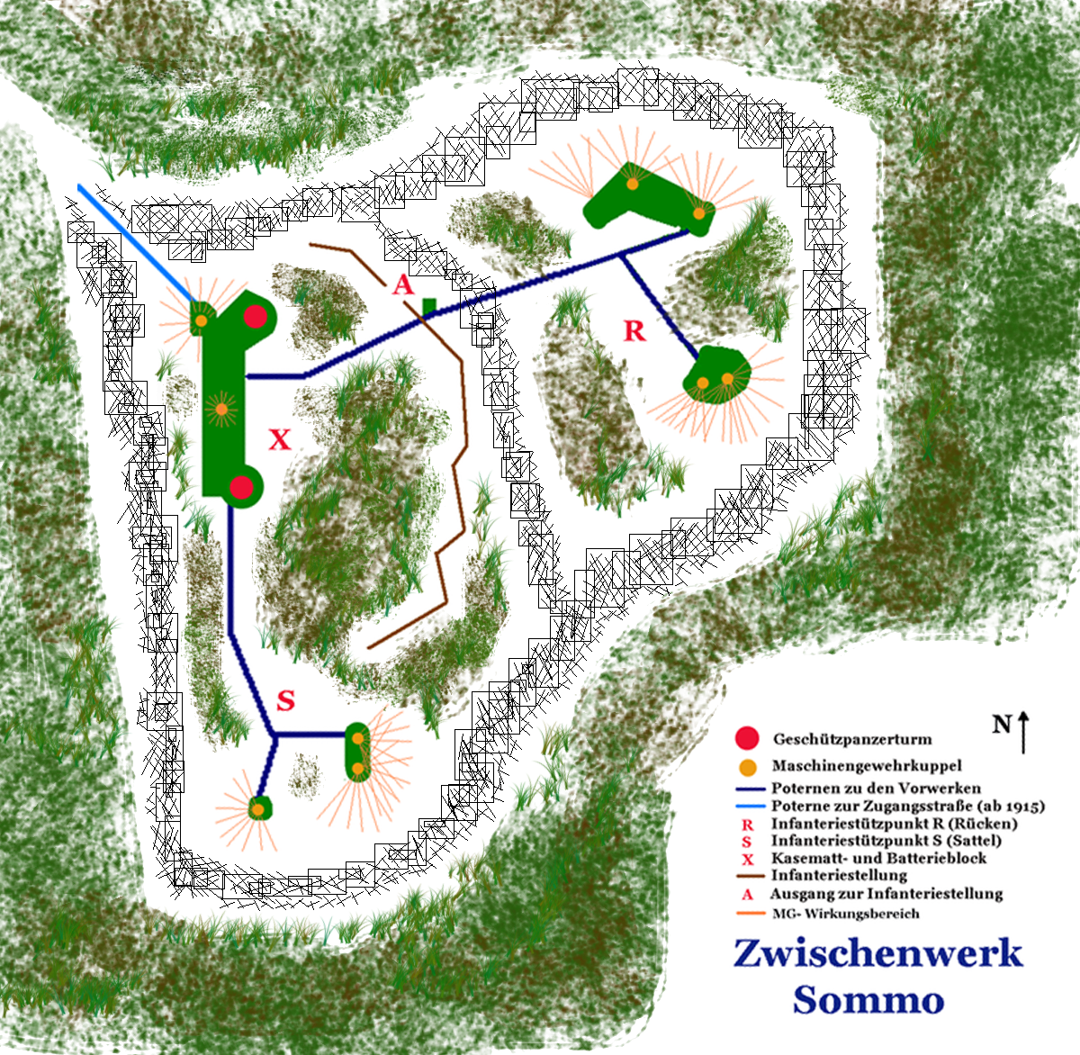 Piano della Forte Sommo alto